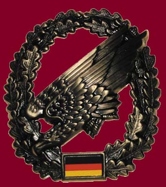 Barettabzeichen Fallschirmjägertruppe der Bundeswehr. Hintergrund: Farbe des Baretts (bordeaux)